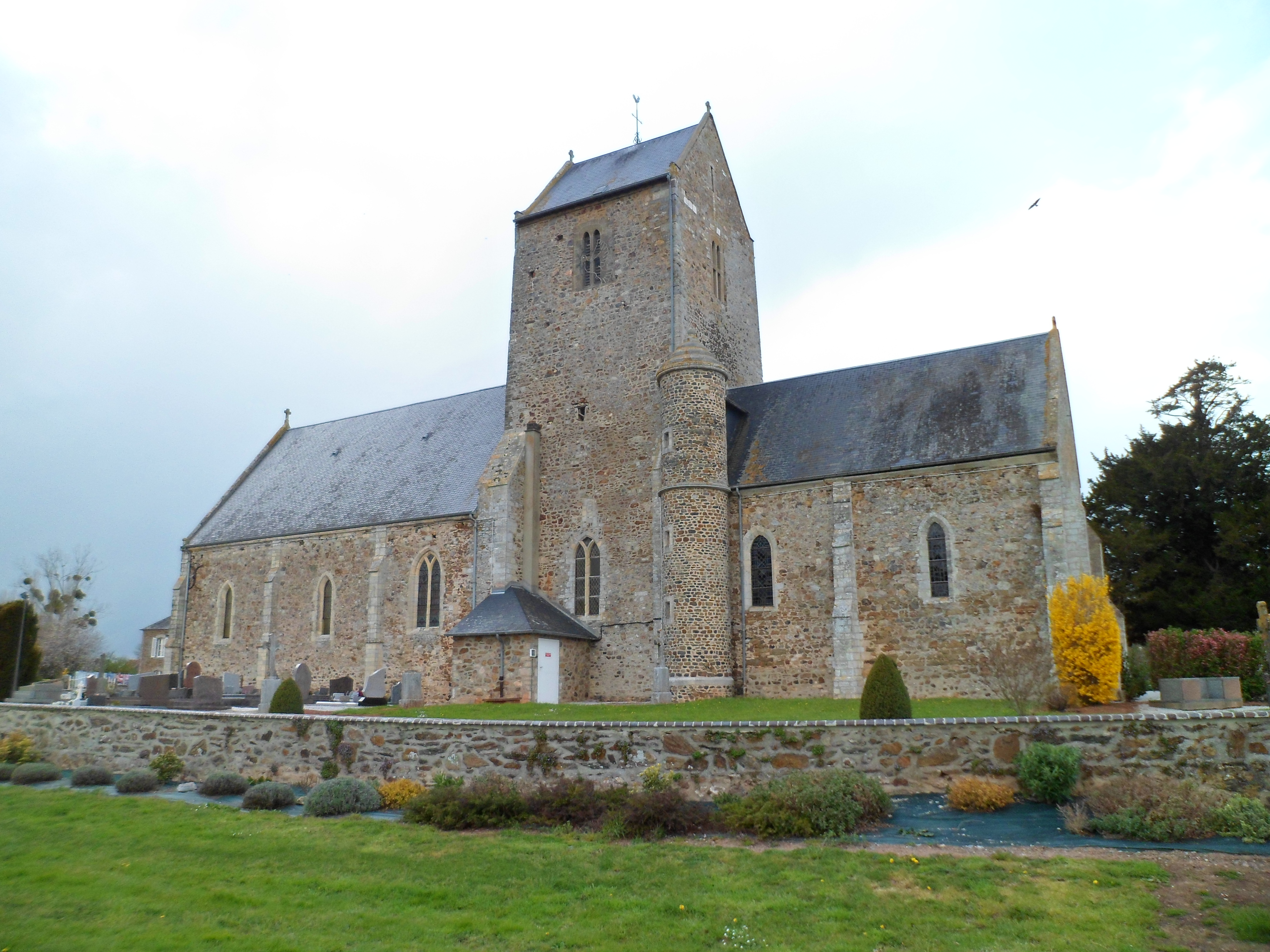 Église Saint-Pierre du Hommet-d'Arthenay